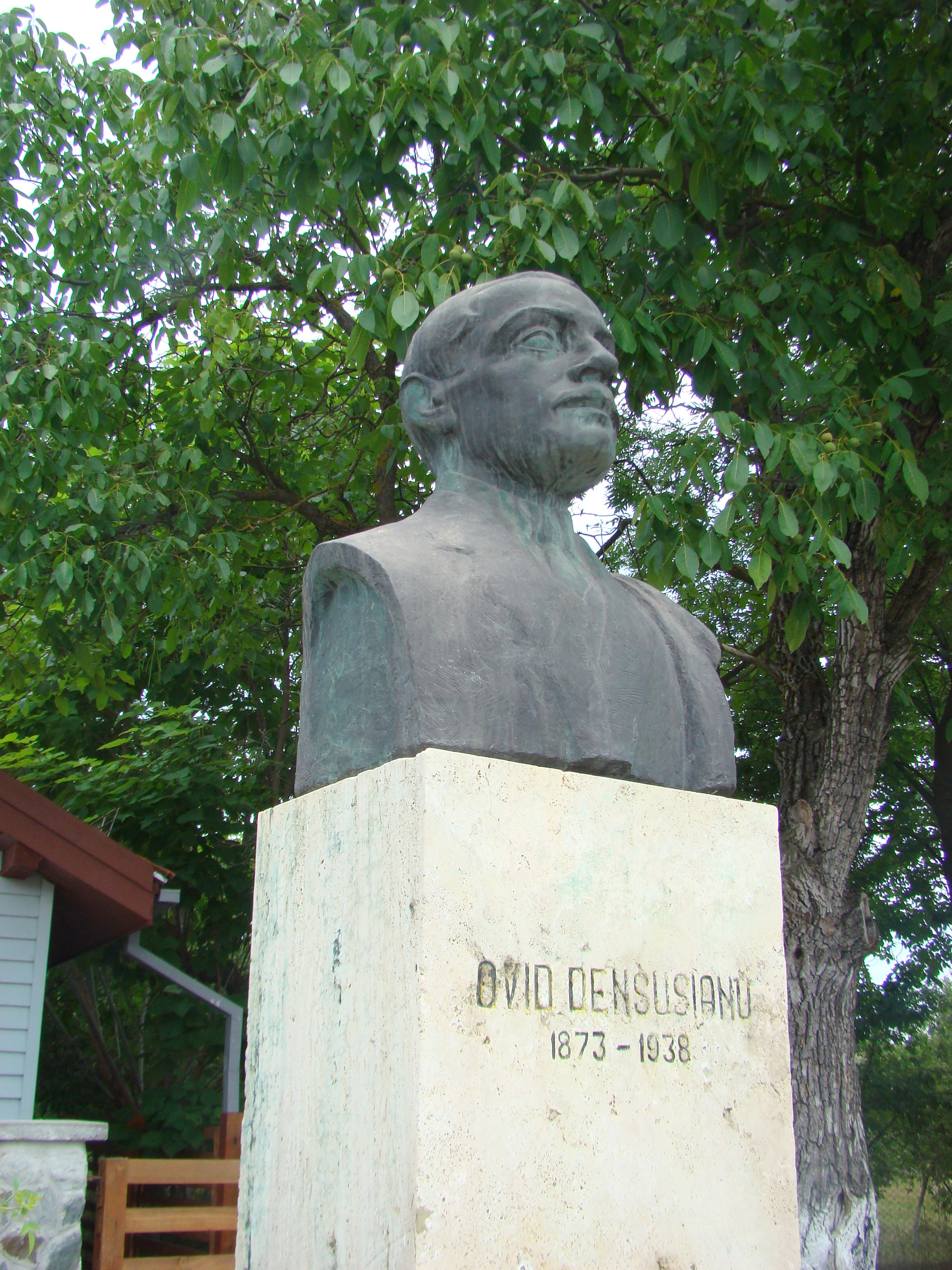 Bustul lui Ovid Densușianu, sat Densuș; comuna Densuș